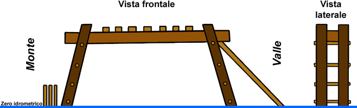 Semplice schema della struttura del ponte romano fatto costruire da Giulio Cesare sul fiume Reno